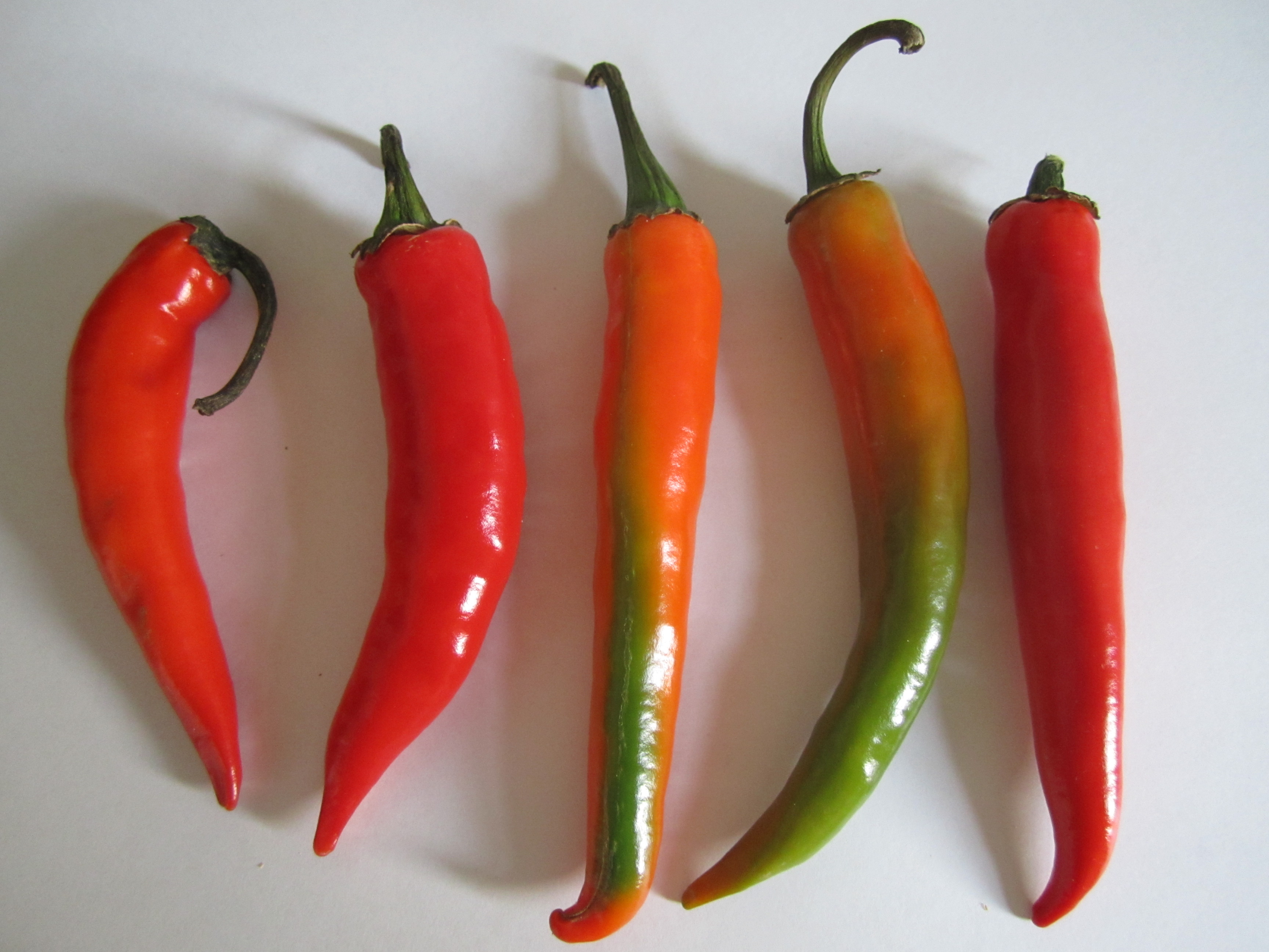 فلفل تند